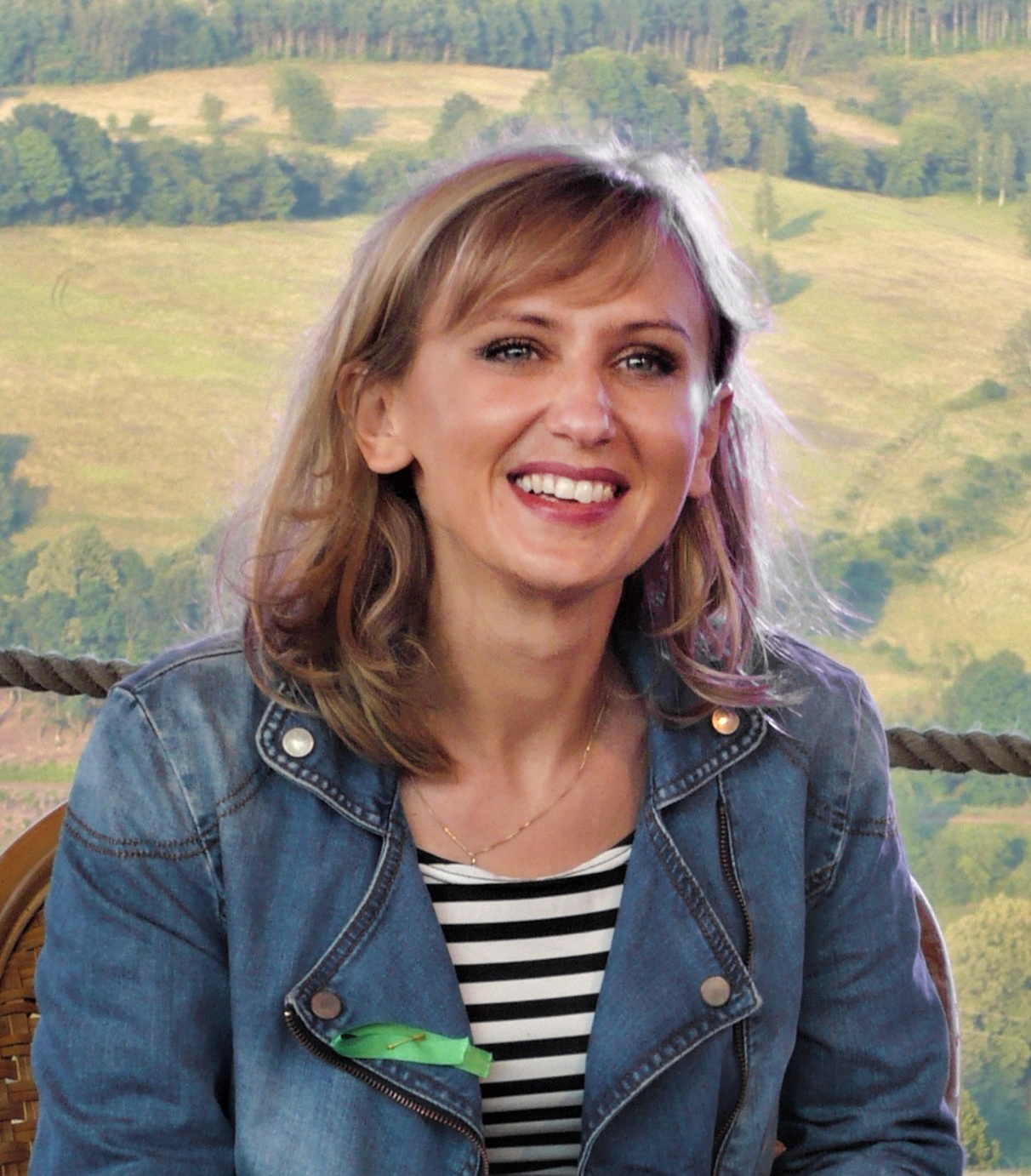 podczas Festiwalu Góry Literatury 2017